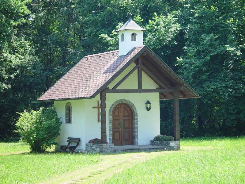 Andachtskapelle im Moorbad Gmös